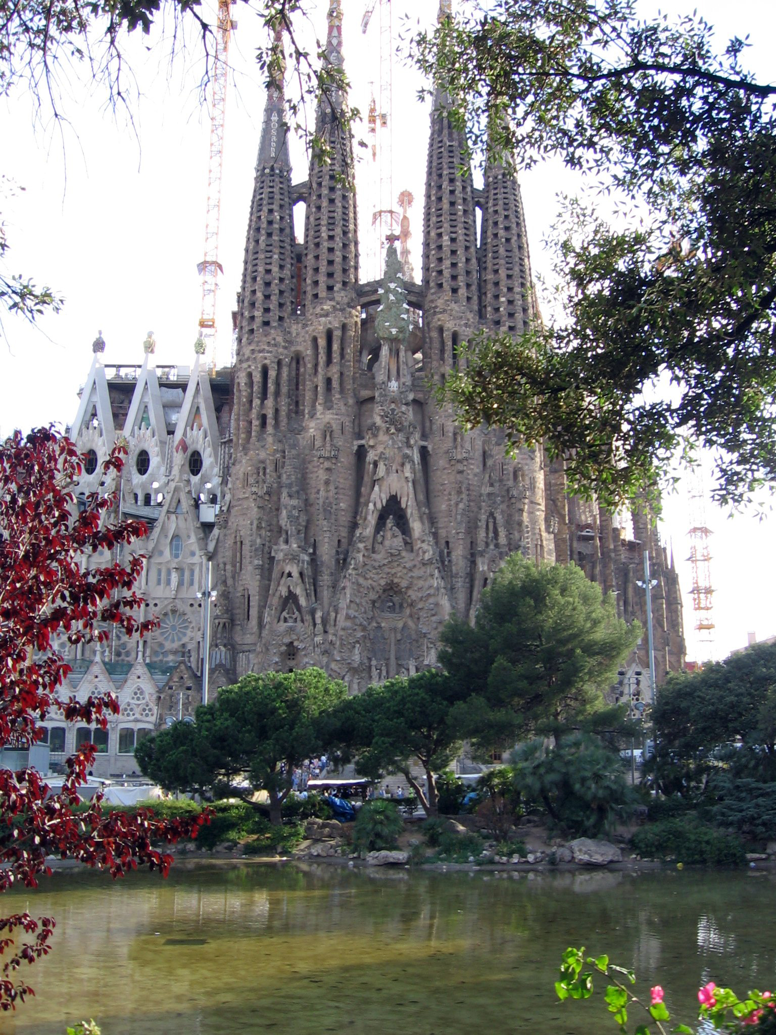 Fachada del Nacimiento, Sagrada Familia (Barcelona).